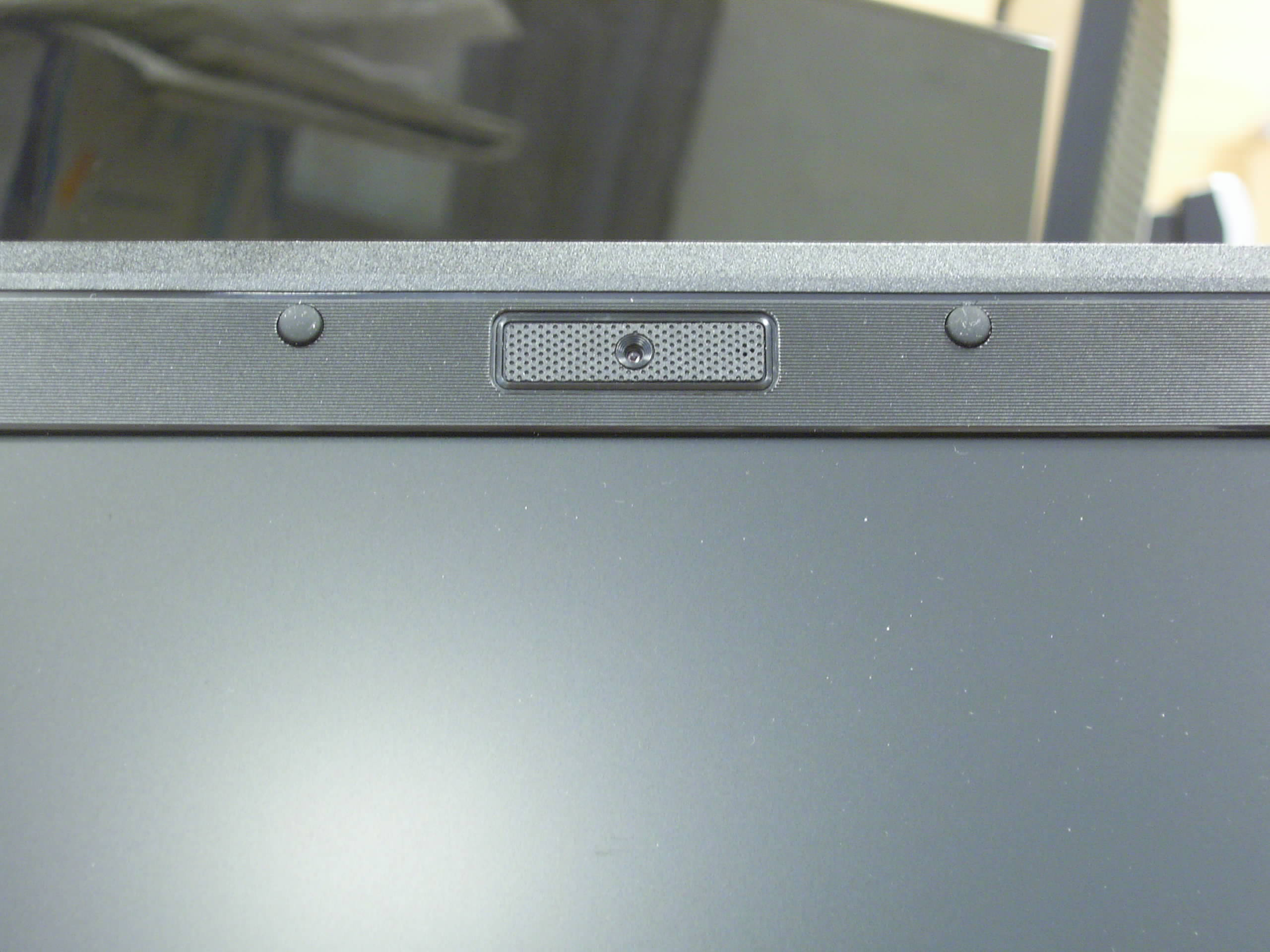 ASUS Eee PC detal,le de la webcam integrada